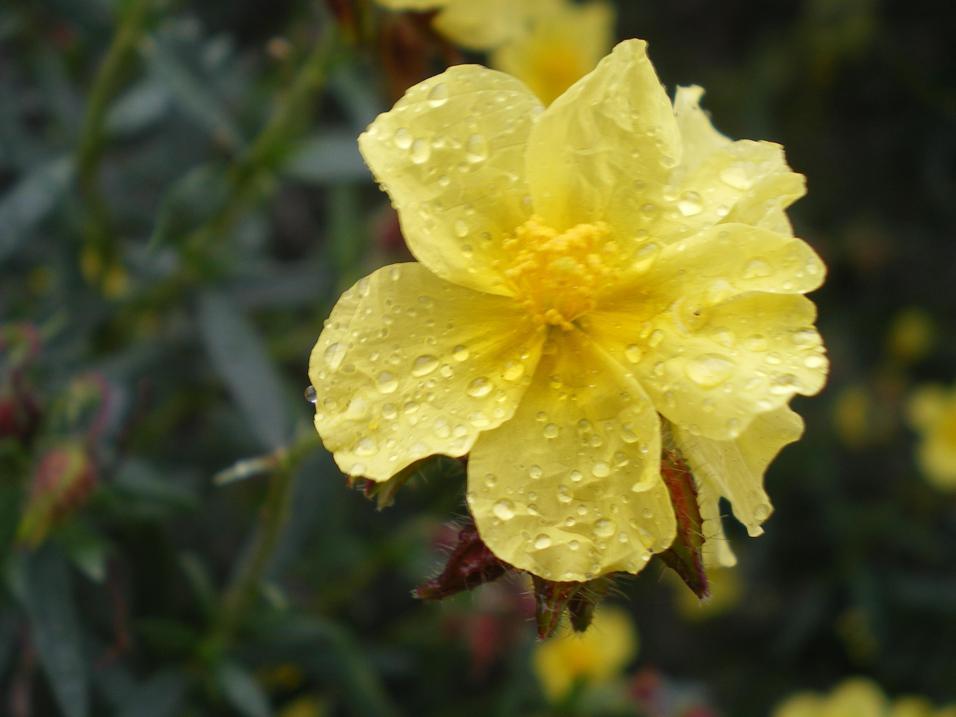 Detalle de la flor de Helianthemum alypoides o jarilla de Sorbas, Almería.